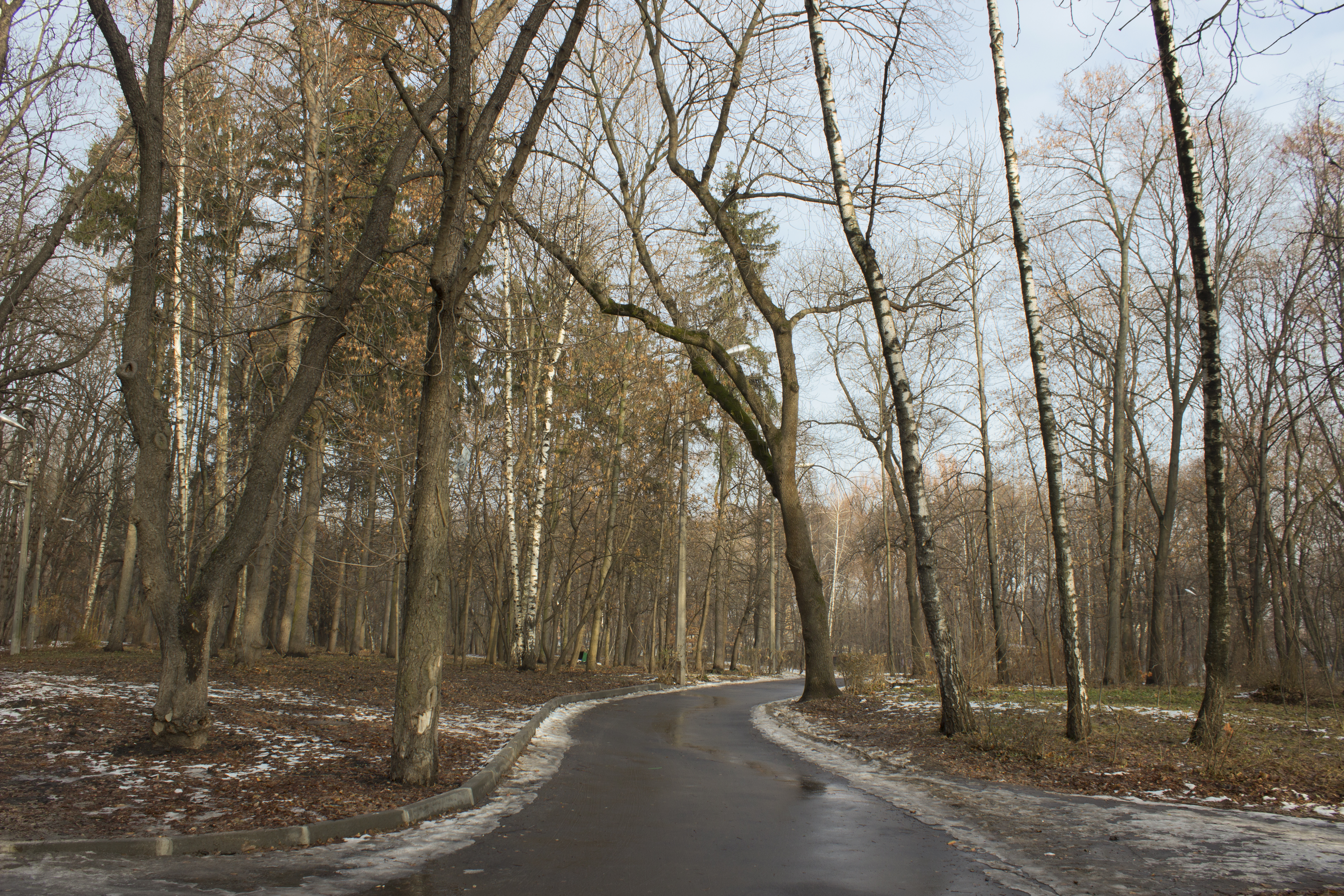 Ім. Пушкіна, Шевченківський район пр. Перемоги